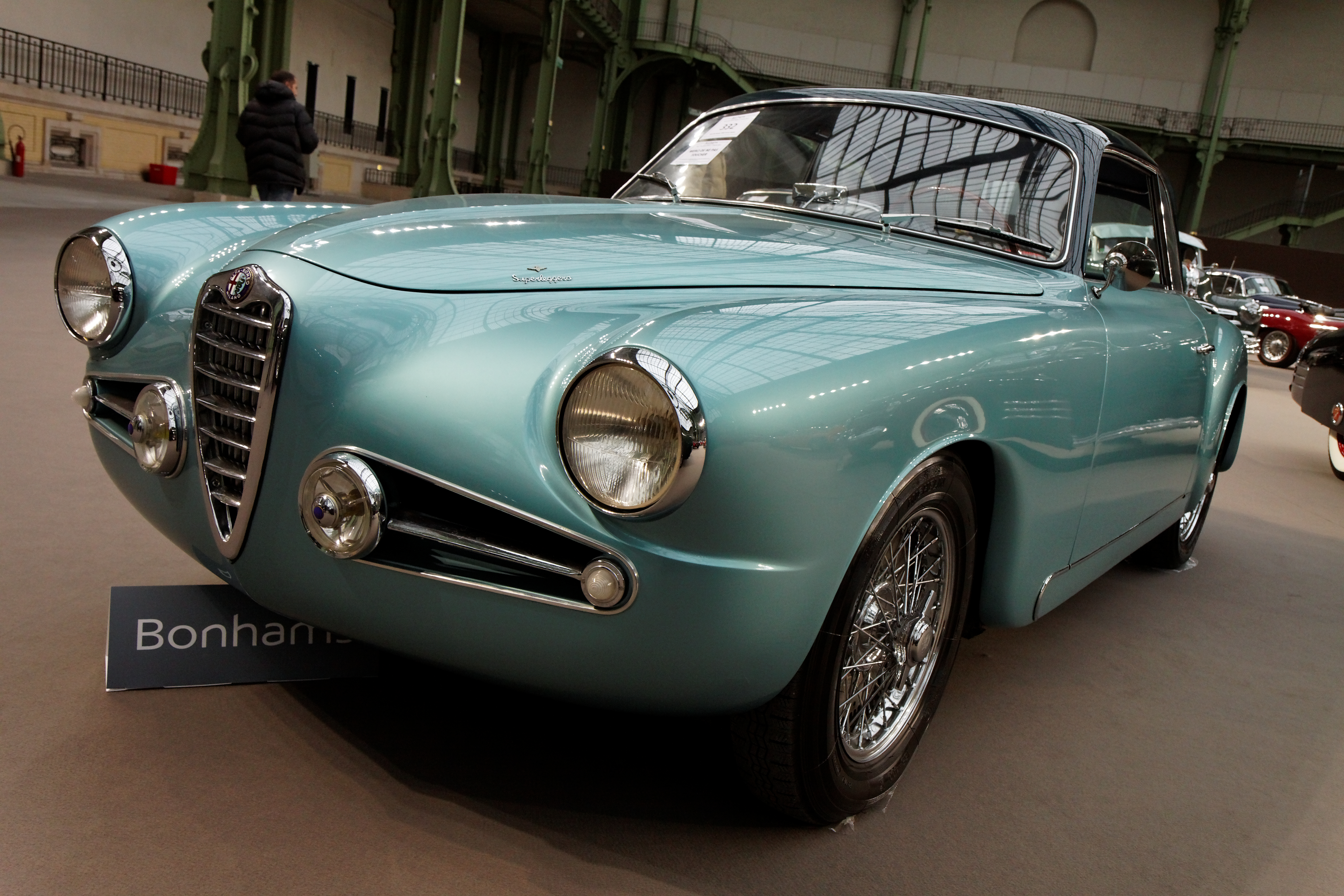 Alfa Romeo 1900 C Super Sprint Touring del 1954, passo corto, motore di cilindrata 1.975 cm3 e cambio a 5 rapporti